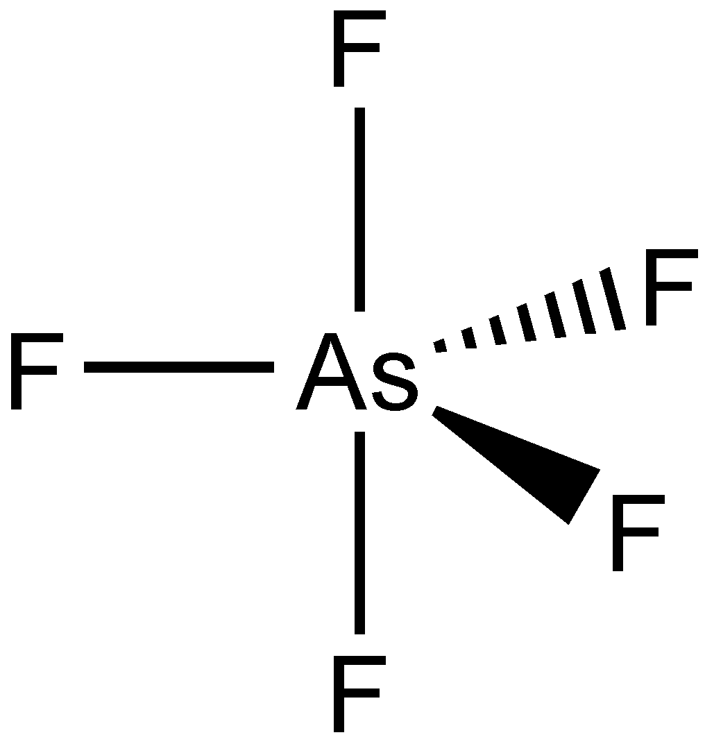 Struktur von Arsenpentafluorid